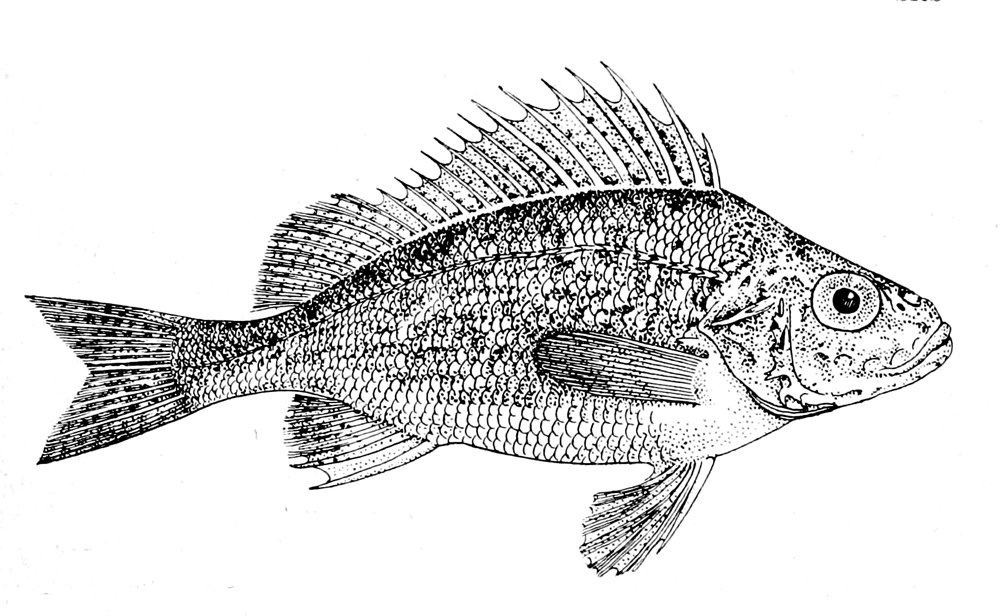 Gymnocephalus cernuus